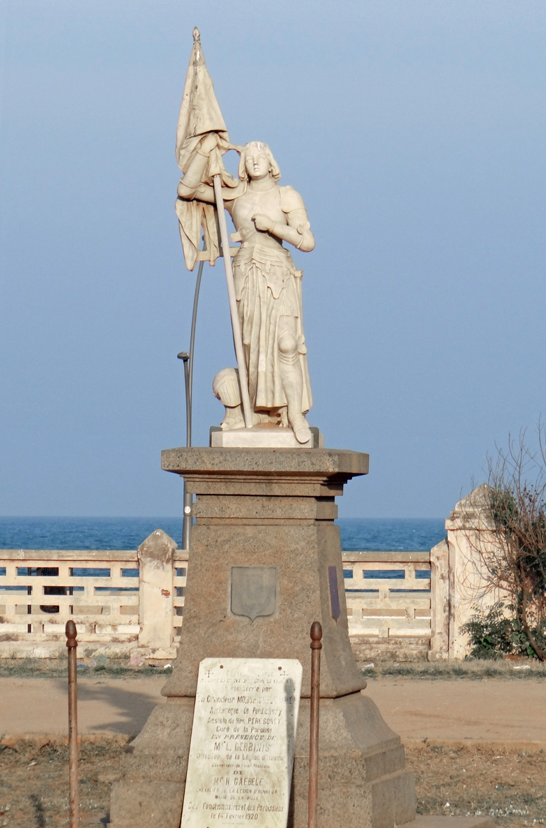 La statue de Jeanne d'Arc fait face à l'église Notre-Dame-des-Anges Au fond, le golfe du Bengale L'église date de 1855, la statue a été inaugurée en 1920, François Gaudart, un industriel français a fait don du terrain et de la statue. Le jardin autour de la statue est en cours de réaménagement. Article de Wikipedia sur Pondichéry